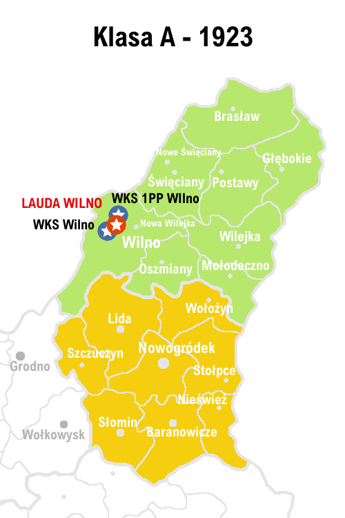 Rozgrywki w piłce nożnej w Wileńskim OZPN w 1923 roku